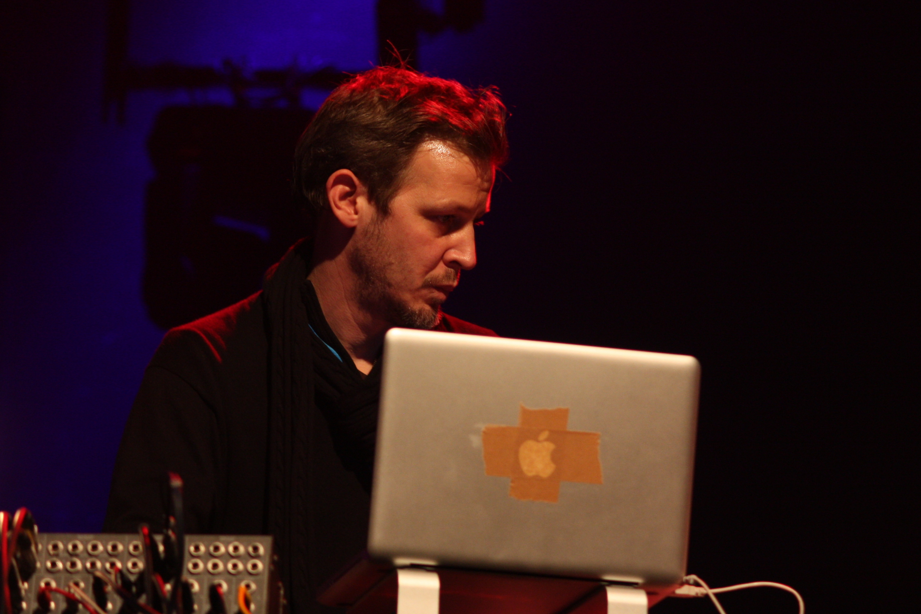 44. Deutsches Jazzfestival Frankfurt 2013: J. Peter Schwalm